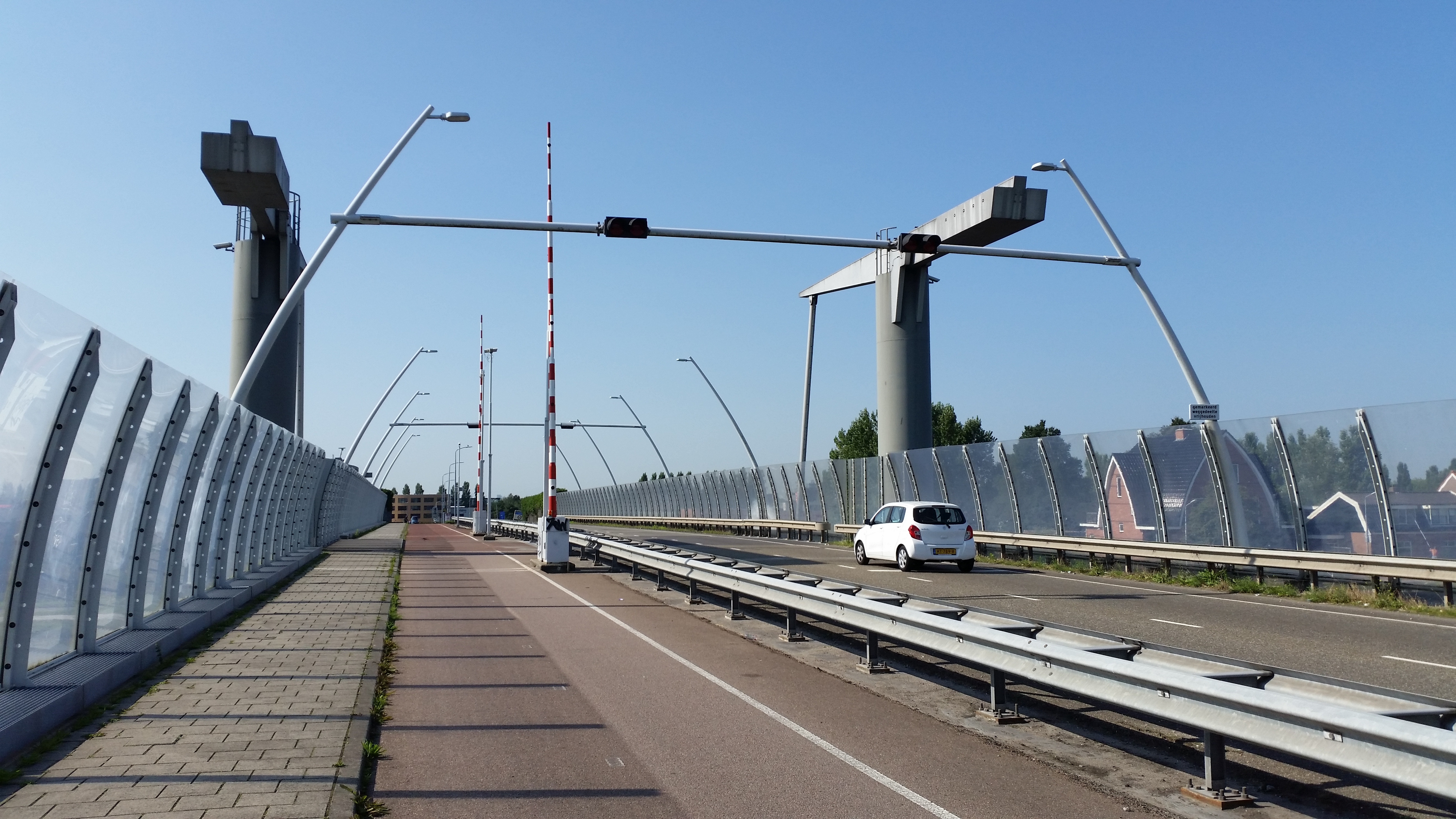 Lijnderbrug overzicht vanuit het oosten